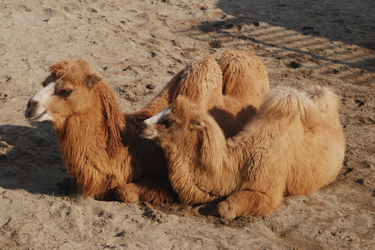 天王寺動物園のフタコブラクダ。